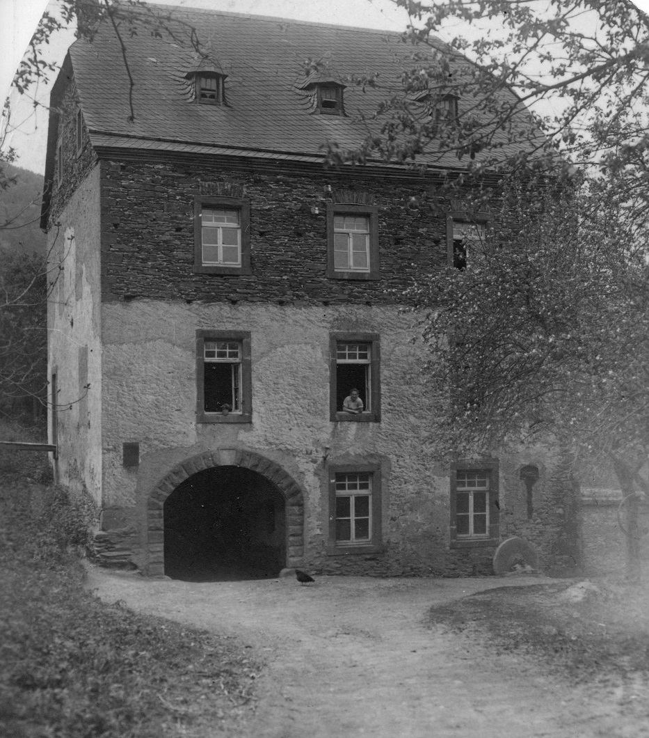 die Mühle der Familie von Blankenfeld-Gebert.Das Foto ist von März 1945.Die Mühle ist ab 1600